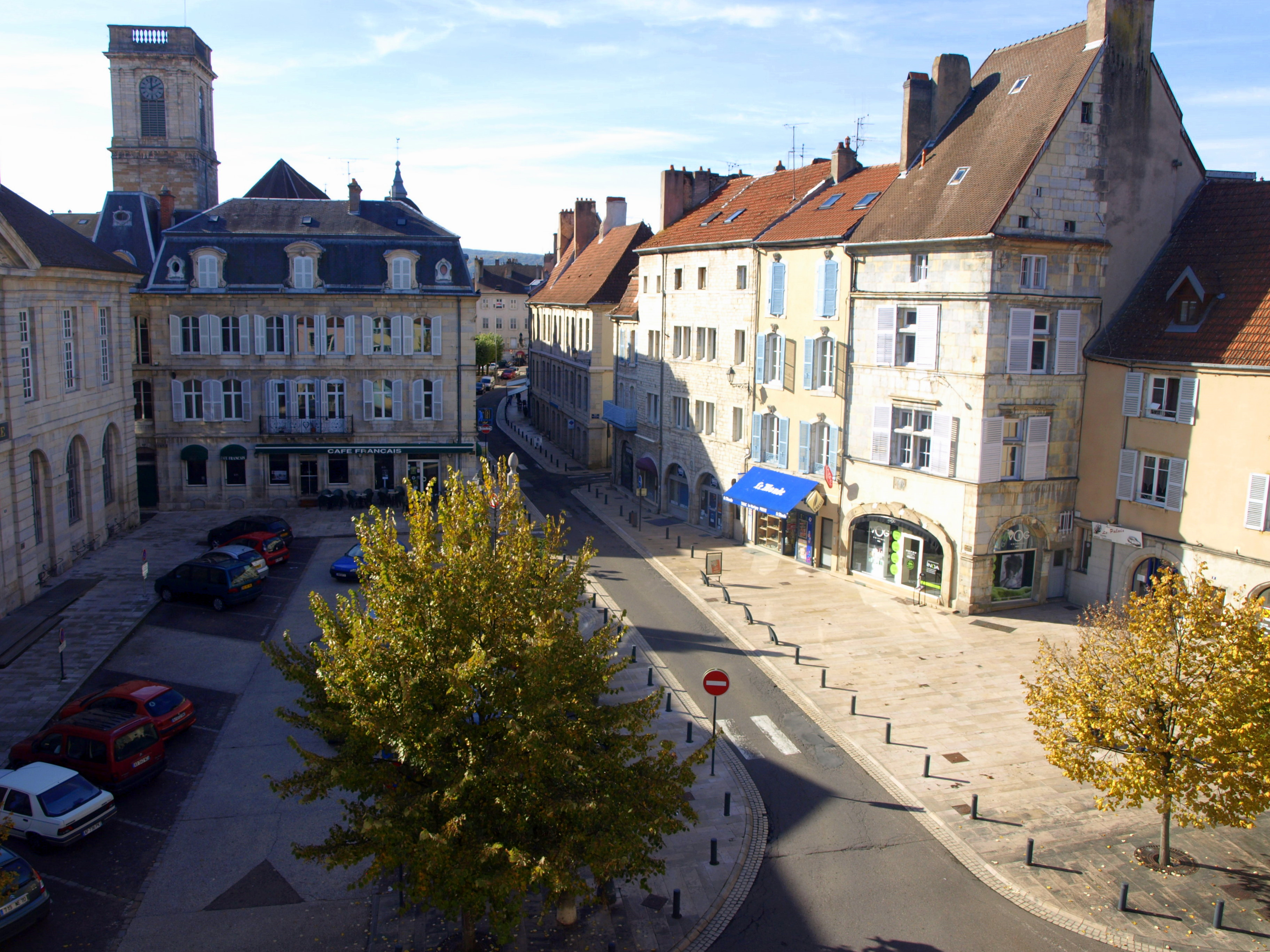 Vesoul (Haute-Saône, France) : Vue de la Place du Palais de justice, avec en arrière-plan le clocher de l'église Saint-George.